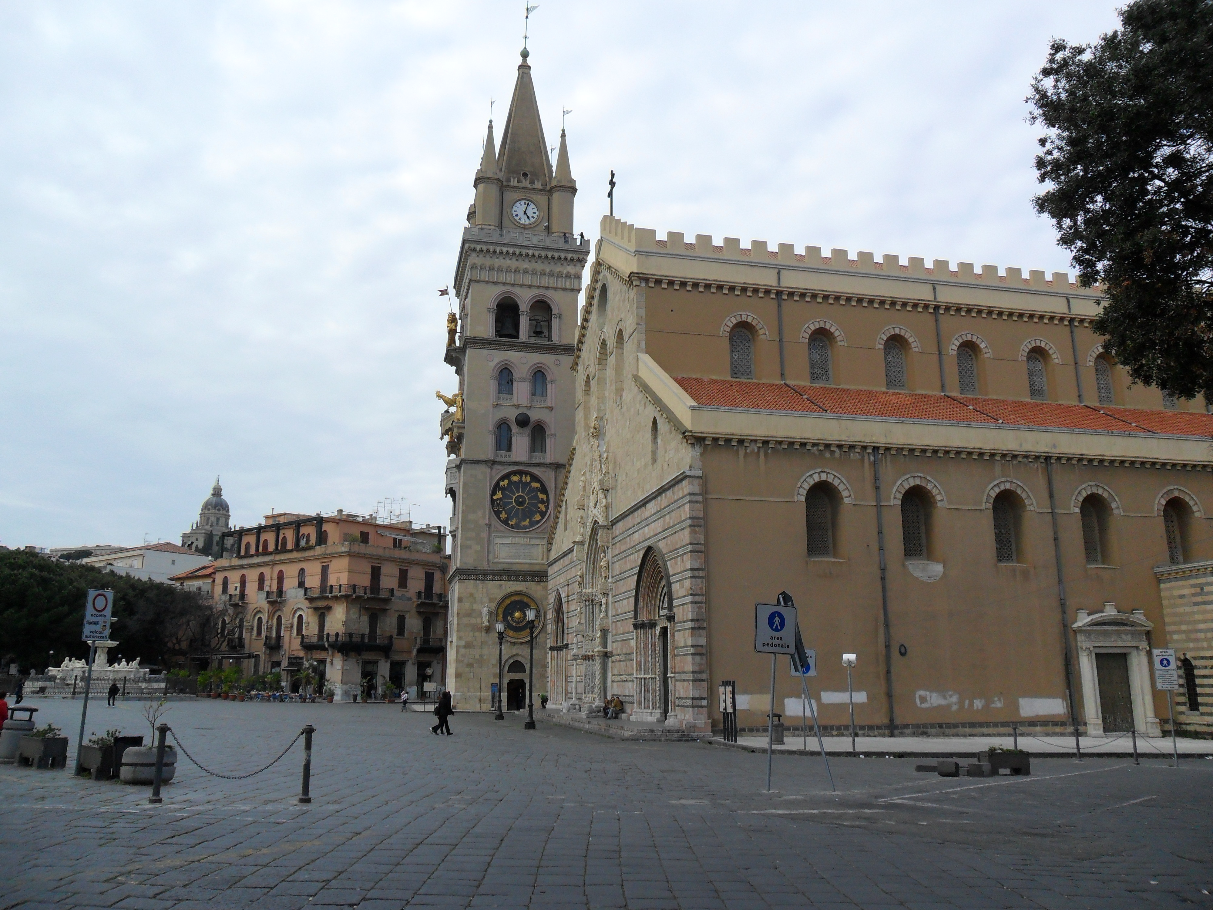 Il duomo cittadino